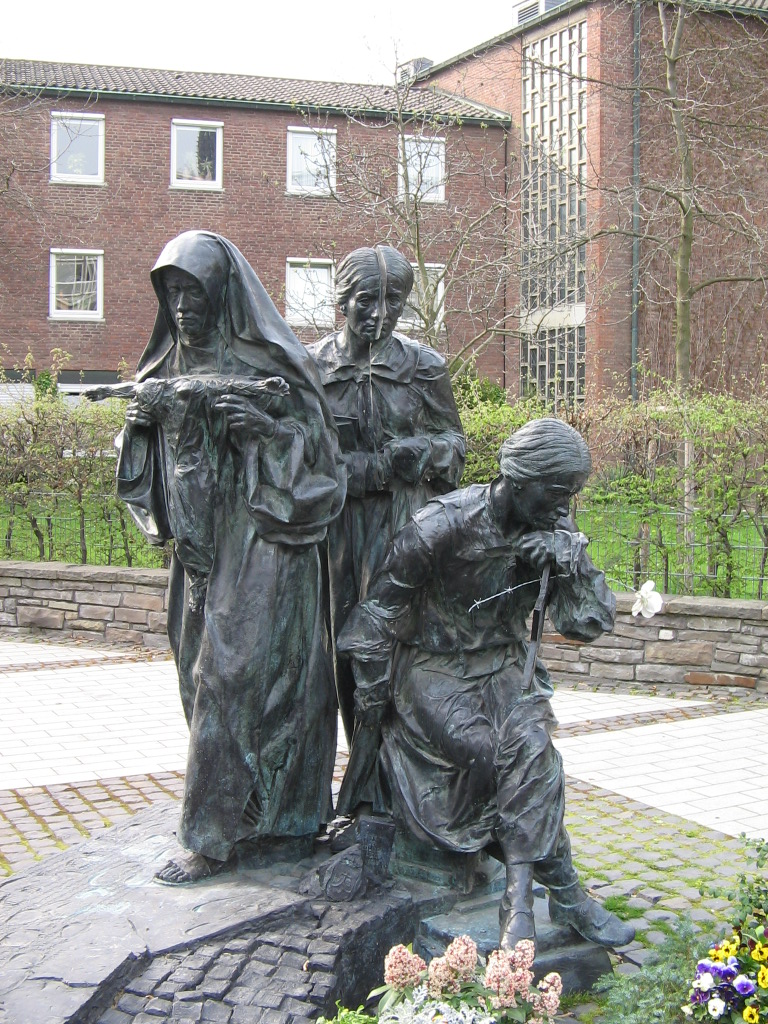 Holocaust-Denkmal / Edith Stein-Denkmal in Köln, Detail, Unter Sachsenhausen